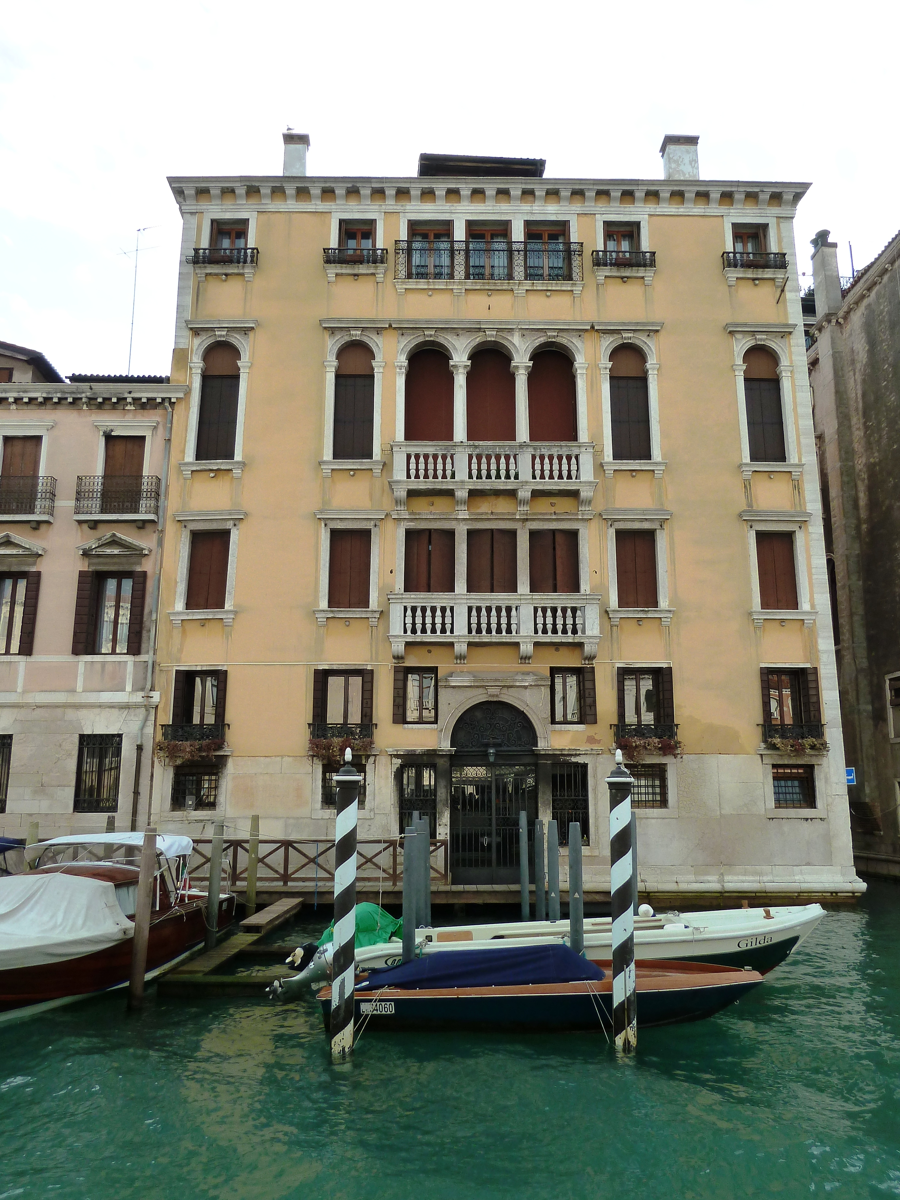 Palazzo Curti Valmarana (Venice)